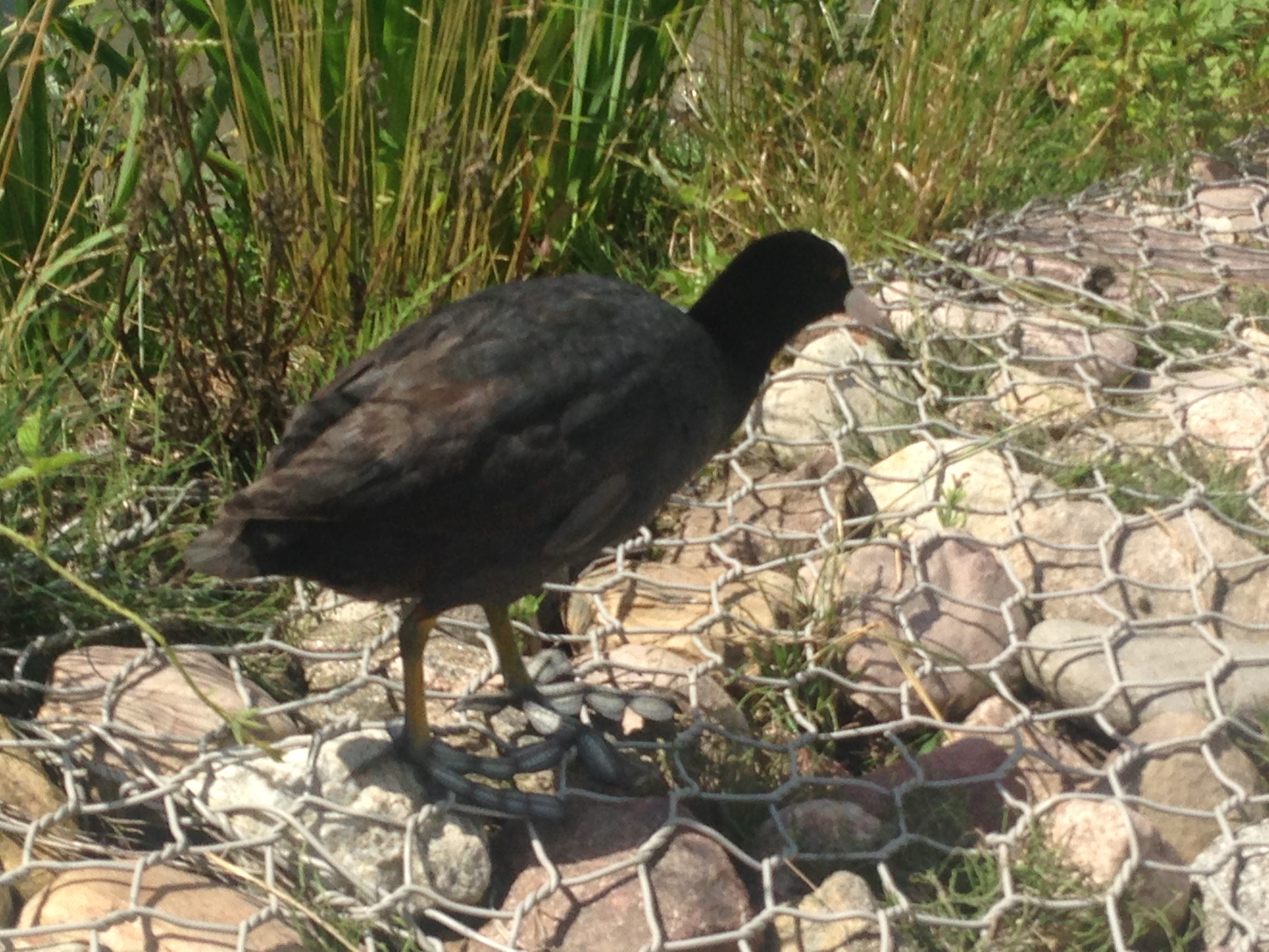 łyska zwyczajna, staw Piekarnicza (Piecki-Migowo).